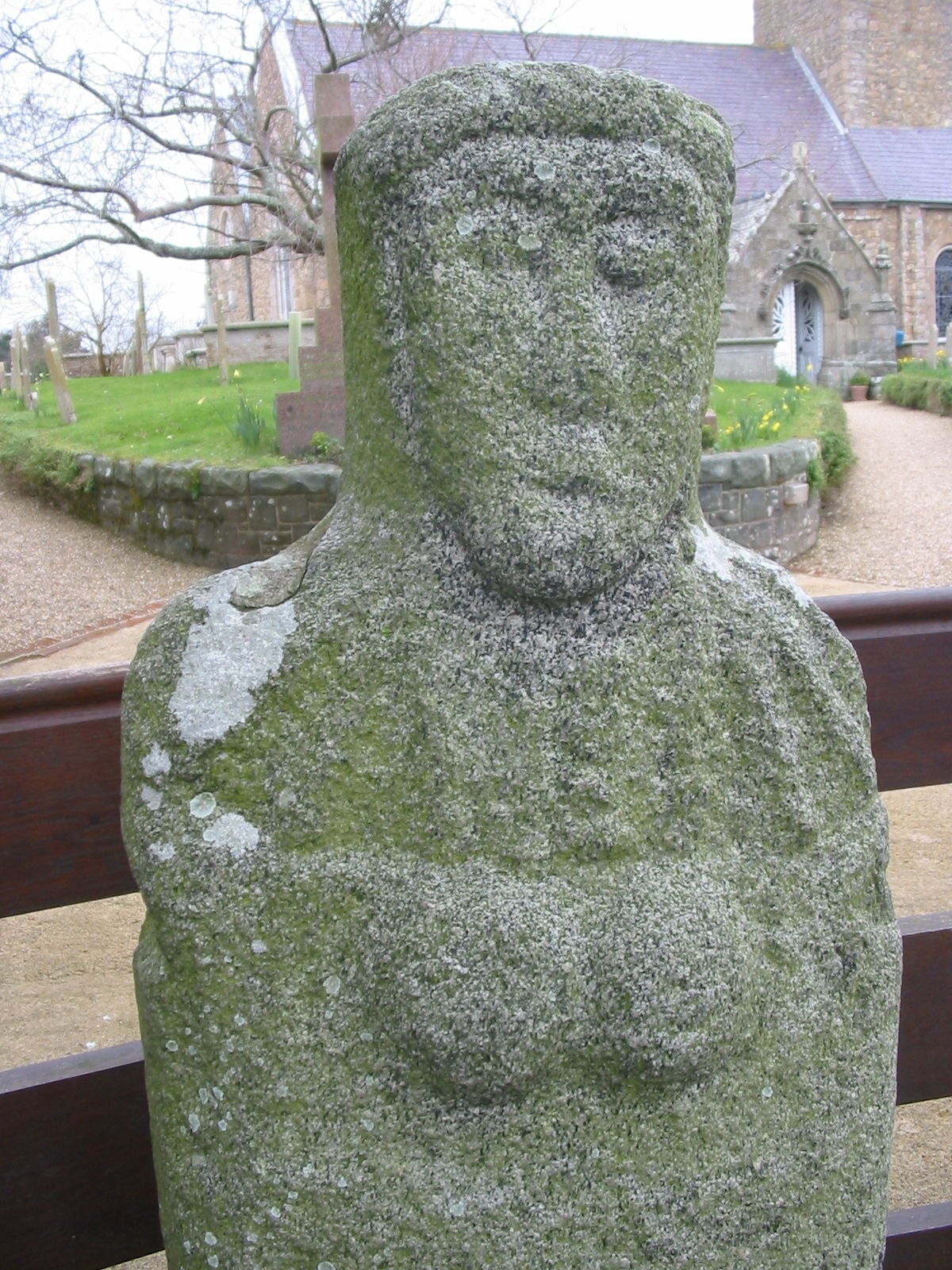 La Gran'mère du Chimquière, Statue menhir, St Martin, Guernsey